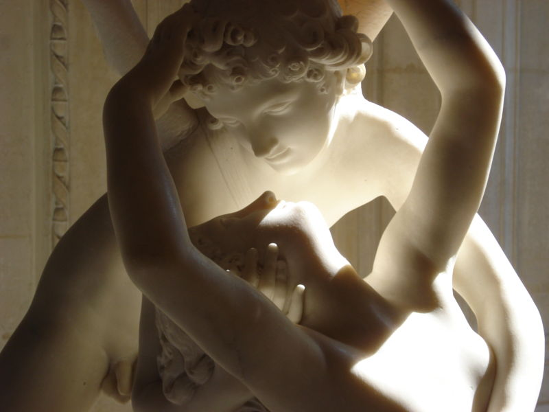 Particolare de " Amore e Psiche" Antonio Canova 1788